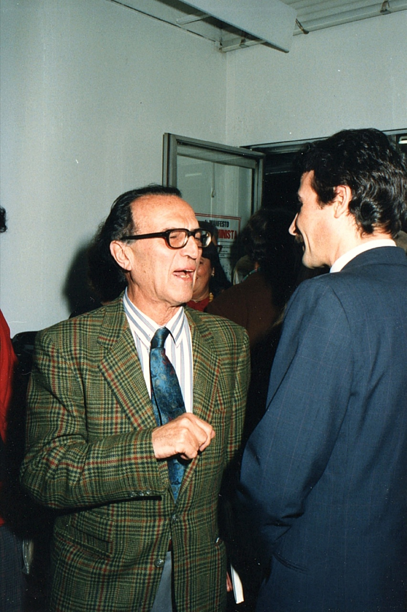 Vèneto: Walter Noetico con Raffaele De Grada (1988 Inaugurazione Neoilluminismo Milano)